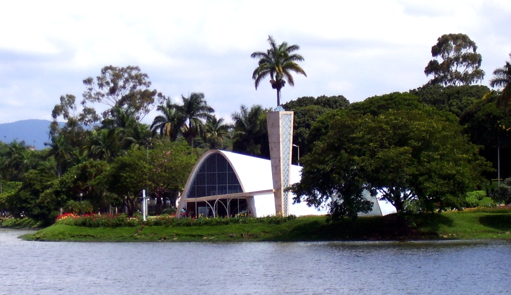 São Francisco de Assis Church, Oscar Niemeyer project. Belo Horizonte City, Minas Gerais, Brazil Igreja São Francisco de Assis, Belo Horizonte. Autor: Cid Costa Neto. Data: 17/Dez/2006.